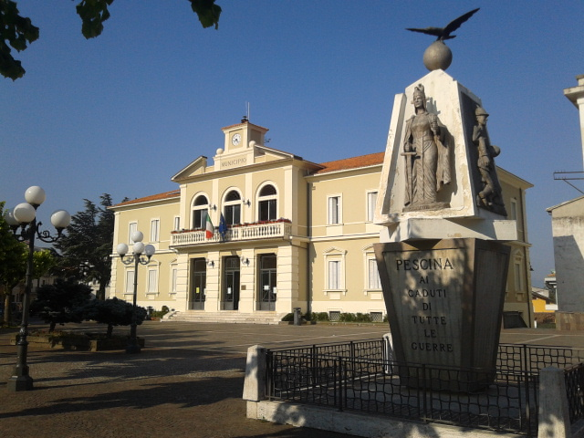 Monumento ai caduti e palazzo municipale di Pescina